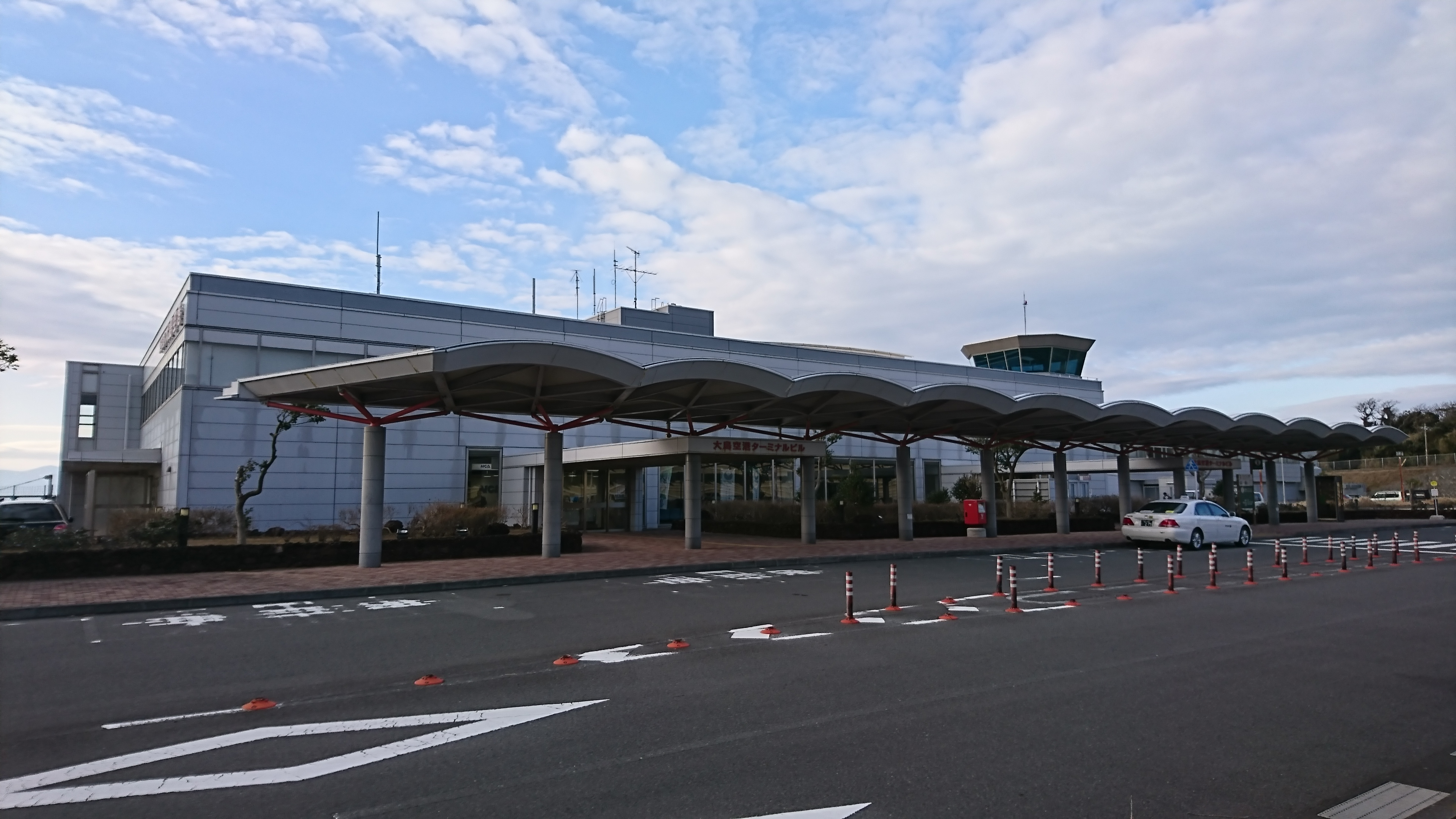 大島空港ターミナルビル外観